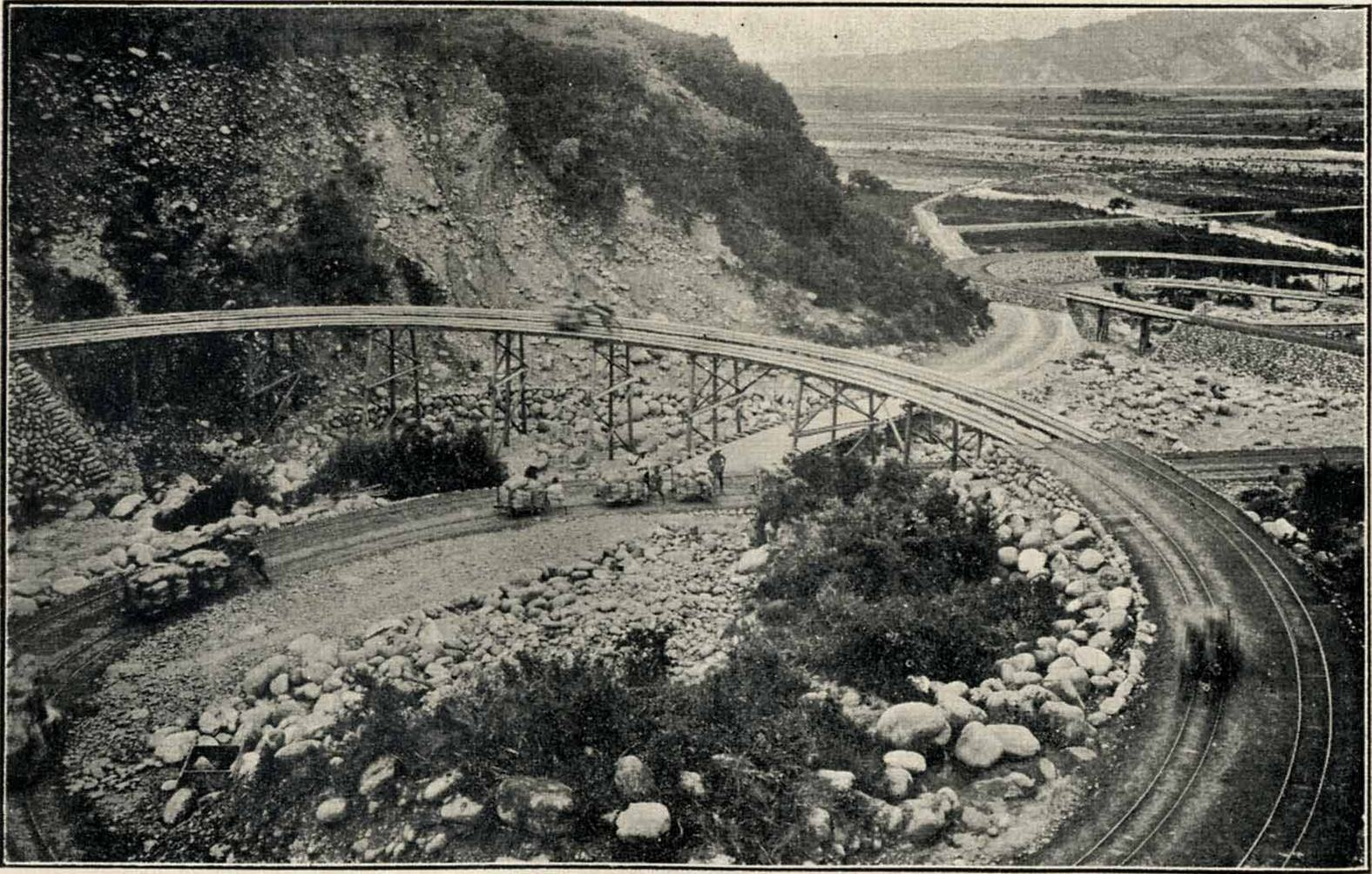 渦狀輕便線(攝於大安溪南岸)。輕便鐵道行經新店(位於伯公坑、后里庄之間)，為了克服后里台地之高度而設計二段式螺旋，可見到工人正推車爬升。